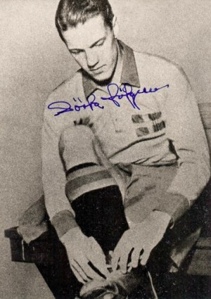 Gösta Löfgren